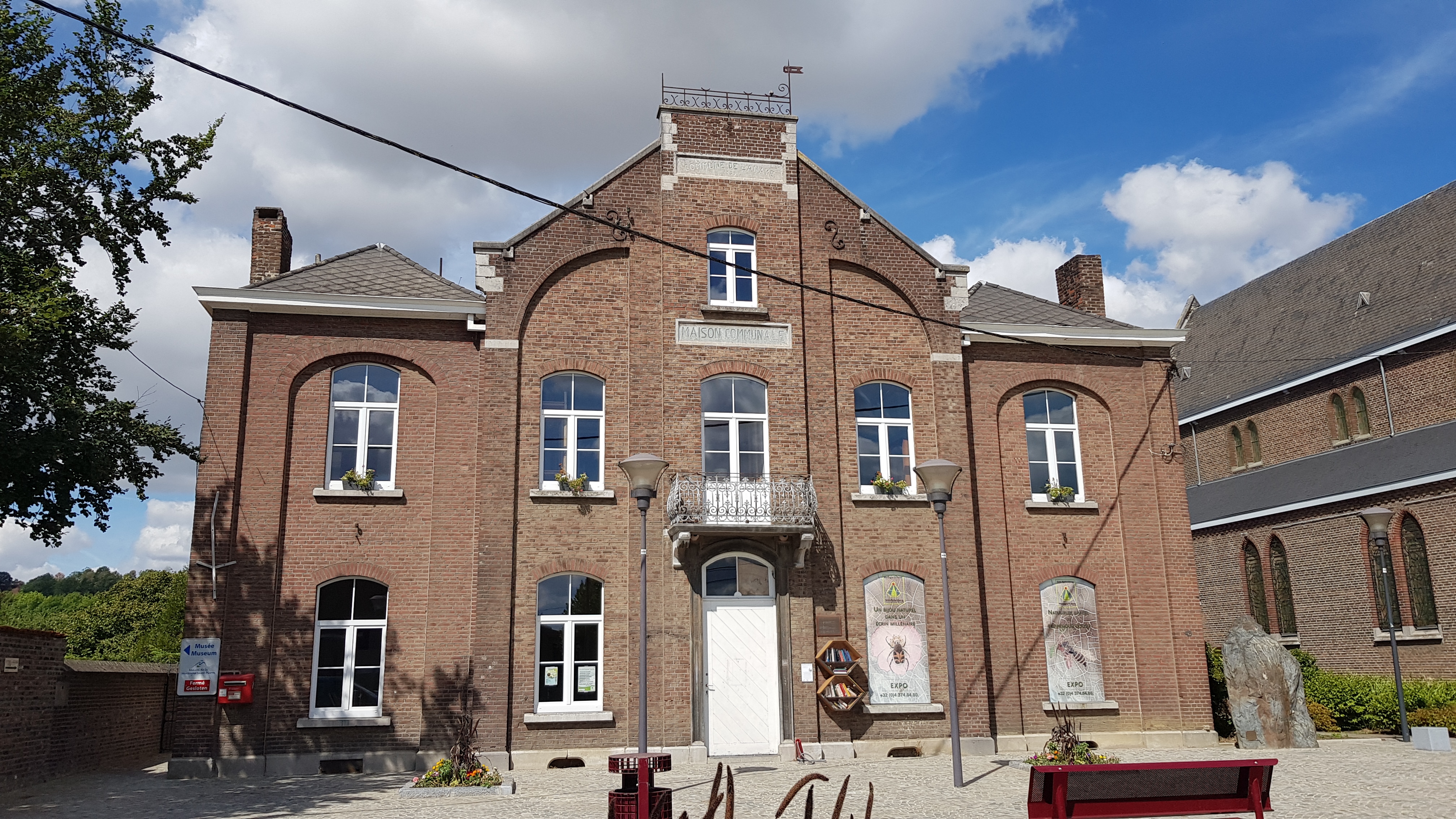 Maison de la Montagne Saint-Pierre, Lanaye, Belgium